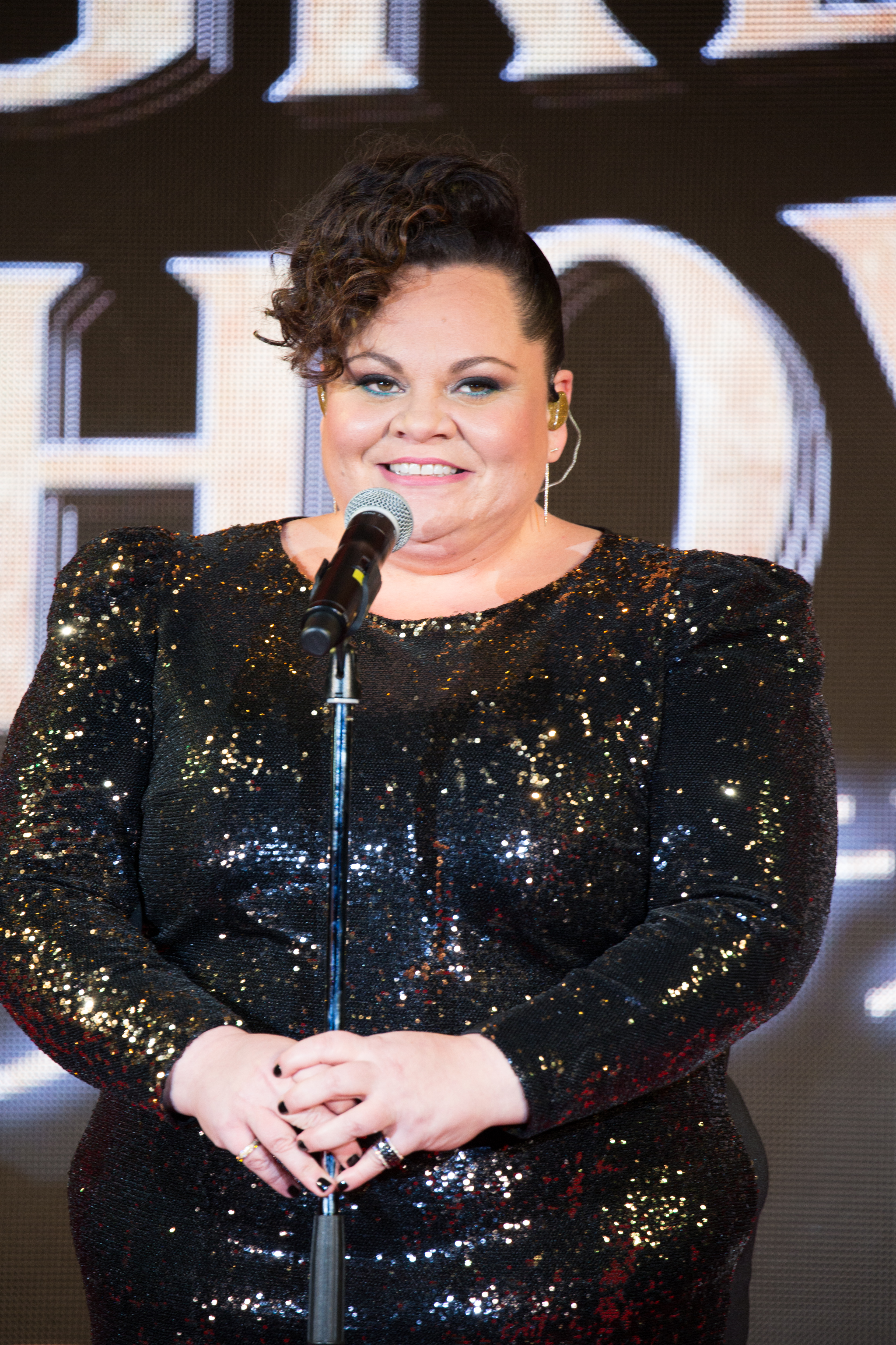 グレイテスト・ショーマン ジャパン・プレミア レッドカーペット キアラ・セトル